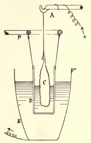 Voltametro